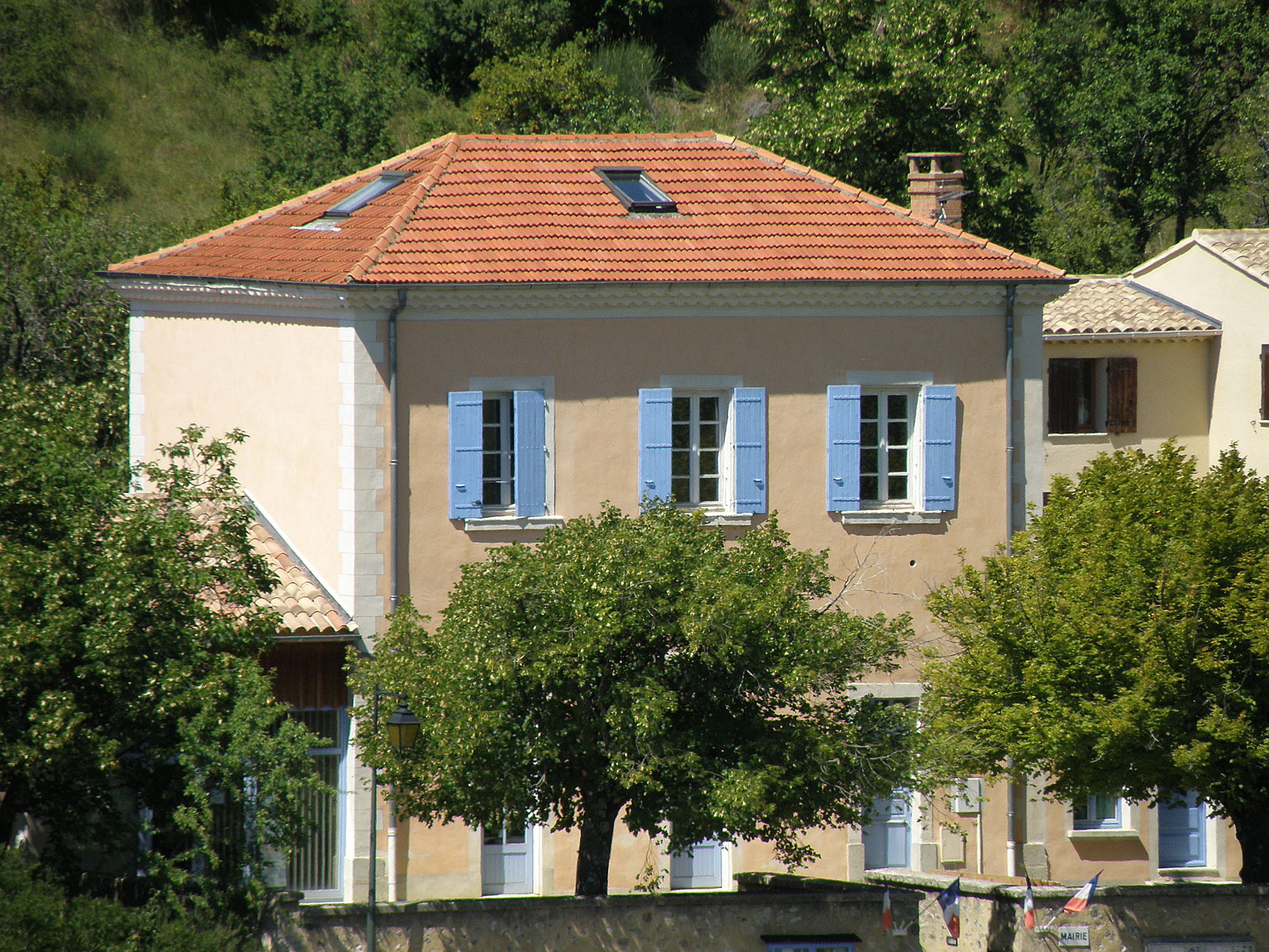 Le Poët-Sigillat (Drôme, France). Mairie, à l'entrée nord-est du village.